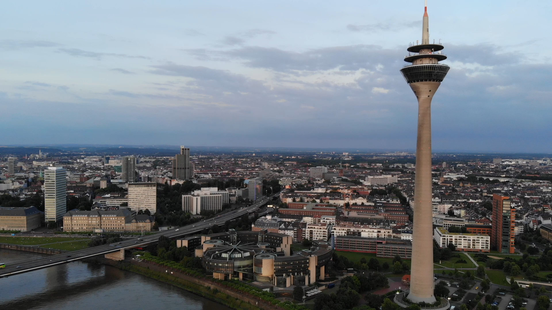 Düsseldorf: Rheinkniebrücke, Landtag von Nordrhein-Westfalen, Rheinturm.